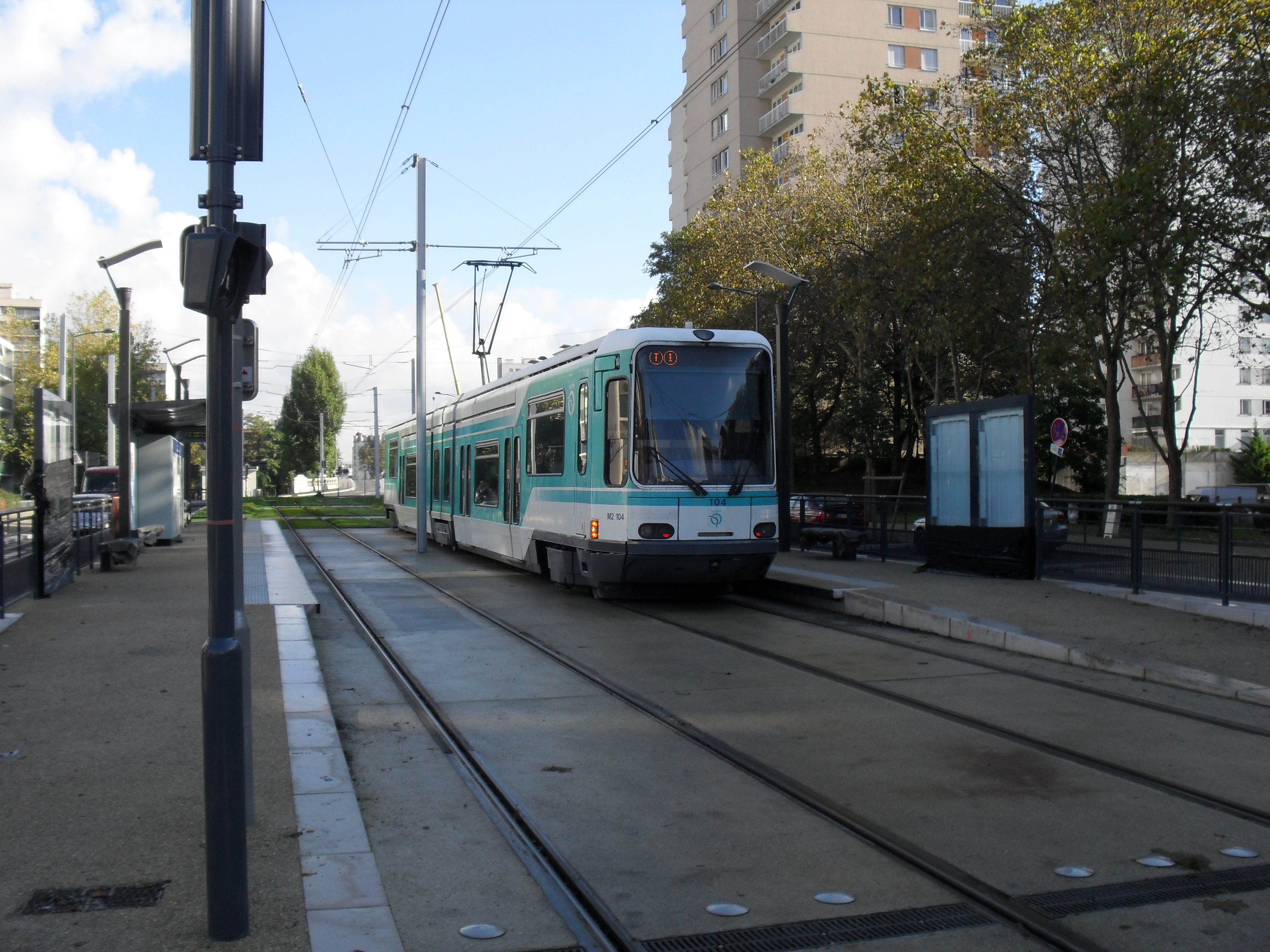 Paris Tramway ligne 1